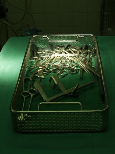 Operationsbesteck auf einem sterilen Tuch